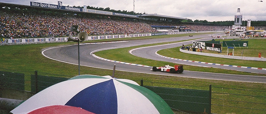 Grosser Preis von Deutschland in Hockkenheim